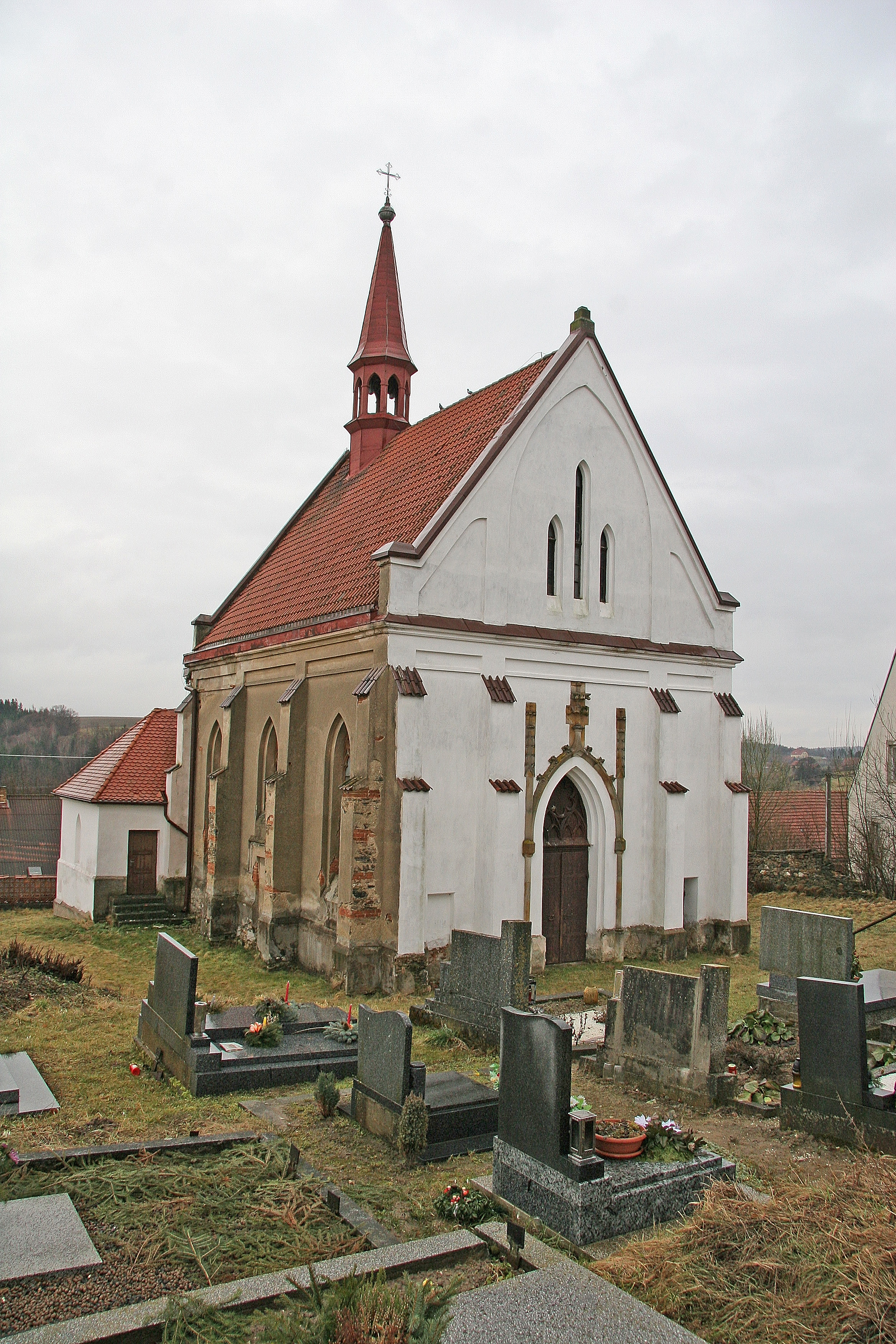 Kostel sv. Martina (Petrovice II), Petrovice II